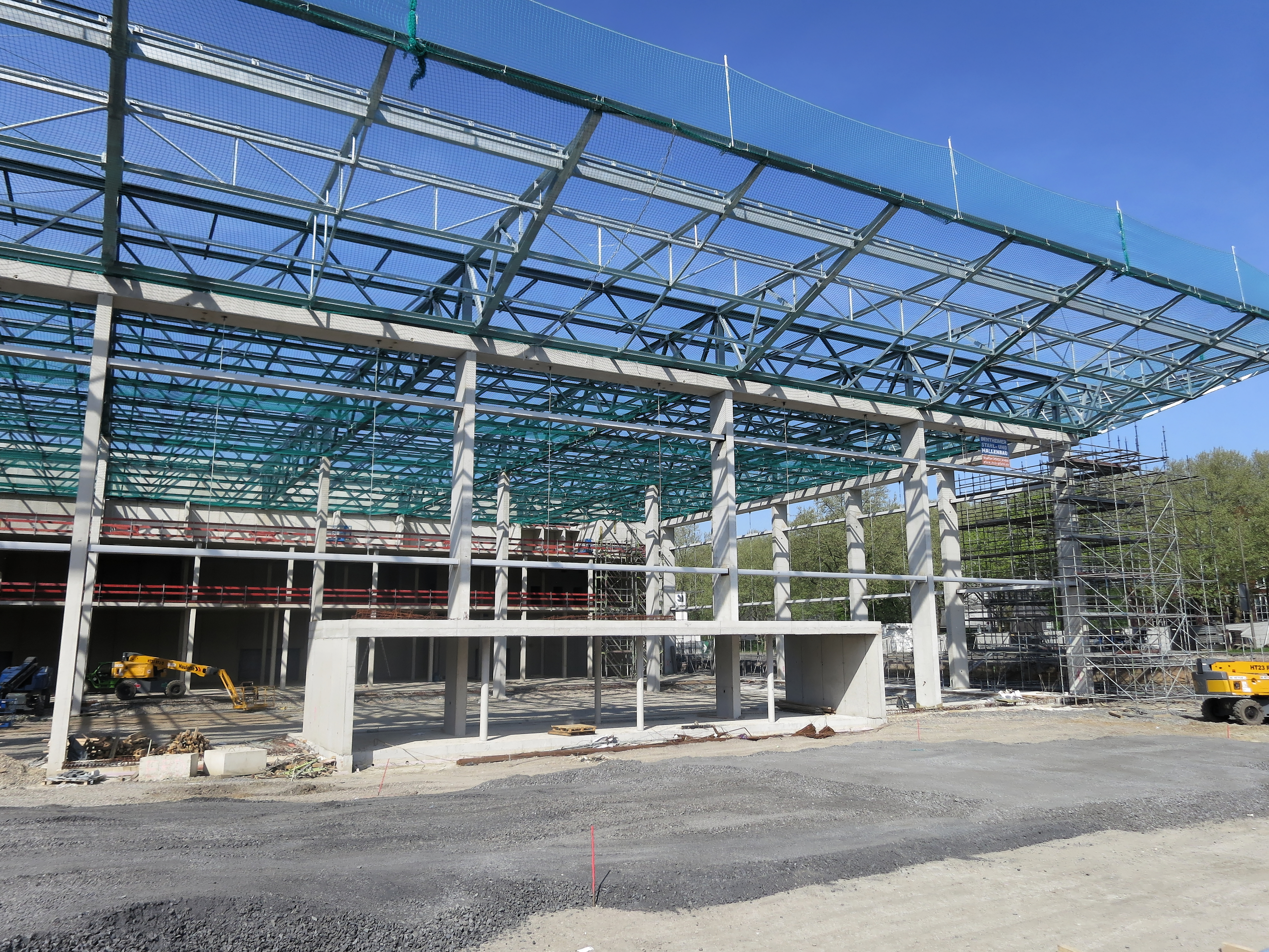 Neubau an den Westfalenhallen, April 2018